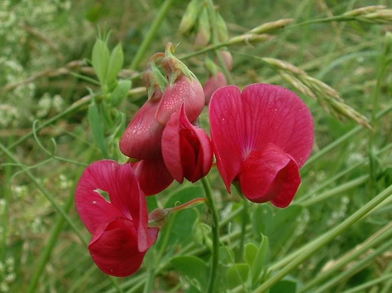 Gesse tubéreuse, Vantoux-et-Longevelle